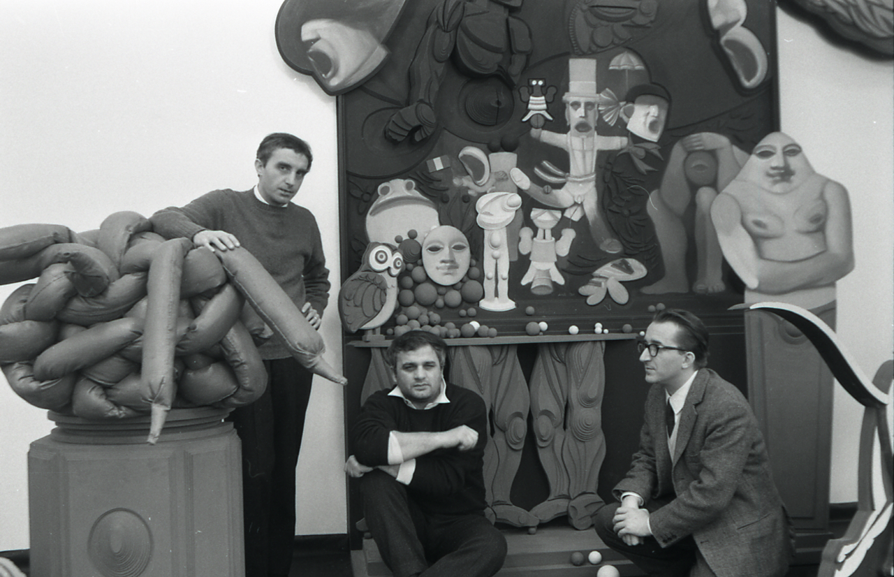 Servizio fotografico : Bologna, 1967 / Paolo Monti. - Strisce: 5, Fotogrammi complessivi: 23 : Negativo b/n, gelatina bromuro d'argento/ pellicola ; 35 mm. - ((I fotogrammi hanno una doppia numerazione. . - Sul portanegativi: Nikon Agfa 21. - Occasione: Inaugurazione o catalogo della mostra di Luciano De Vita alla Galleria de' Foscherari a Bologna, che si tenne dal 9 dicembre 1967 al 12 gennaio 1968. - Fonte: Agenda di Paolo Monti: Monti/ 3 aprile 1966 - 9 marzo 1971/ 12421-16823 (1966-1971), presso Archivio Paolo Monti